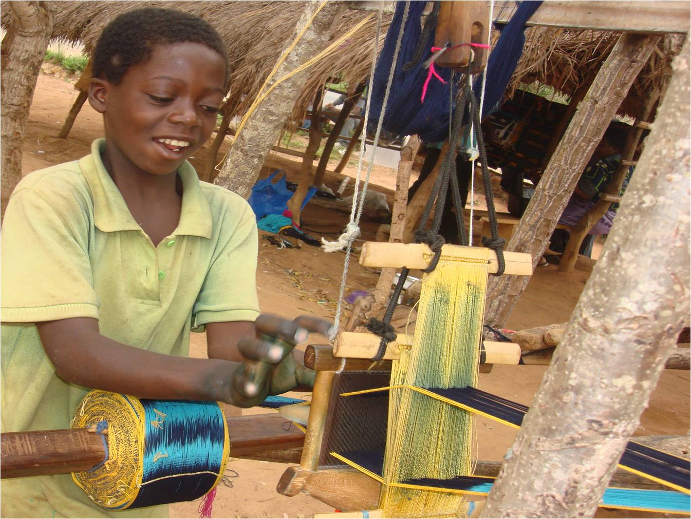 Petit tisserand en apprentissage du métier (Côte d'Ivoire)